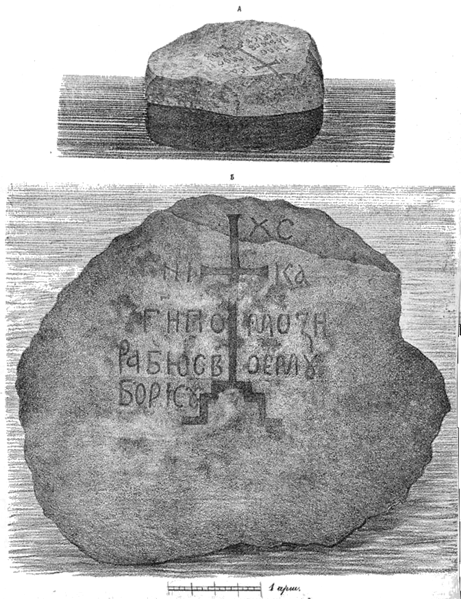 Двинской или Борисов камень 1-й.)